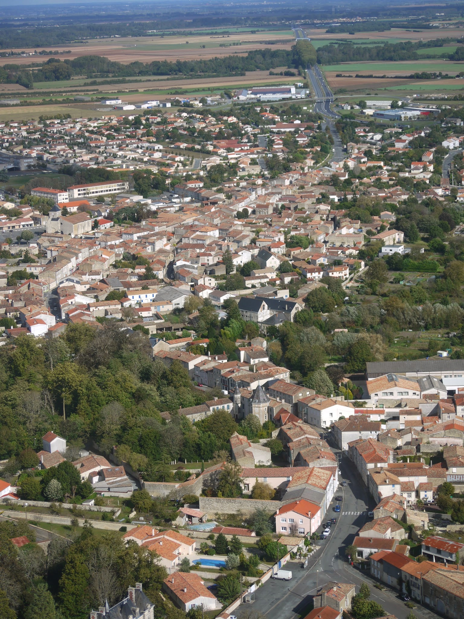 Vue aérienne de la rue principale